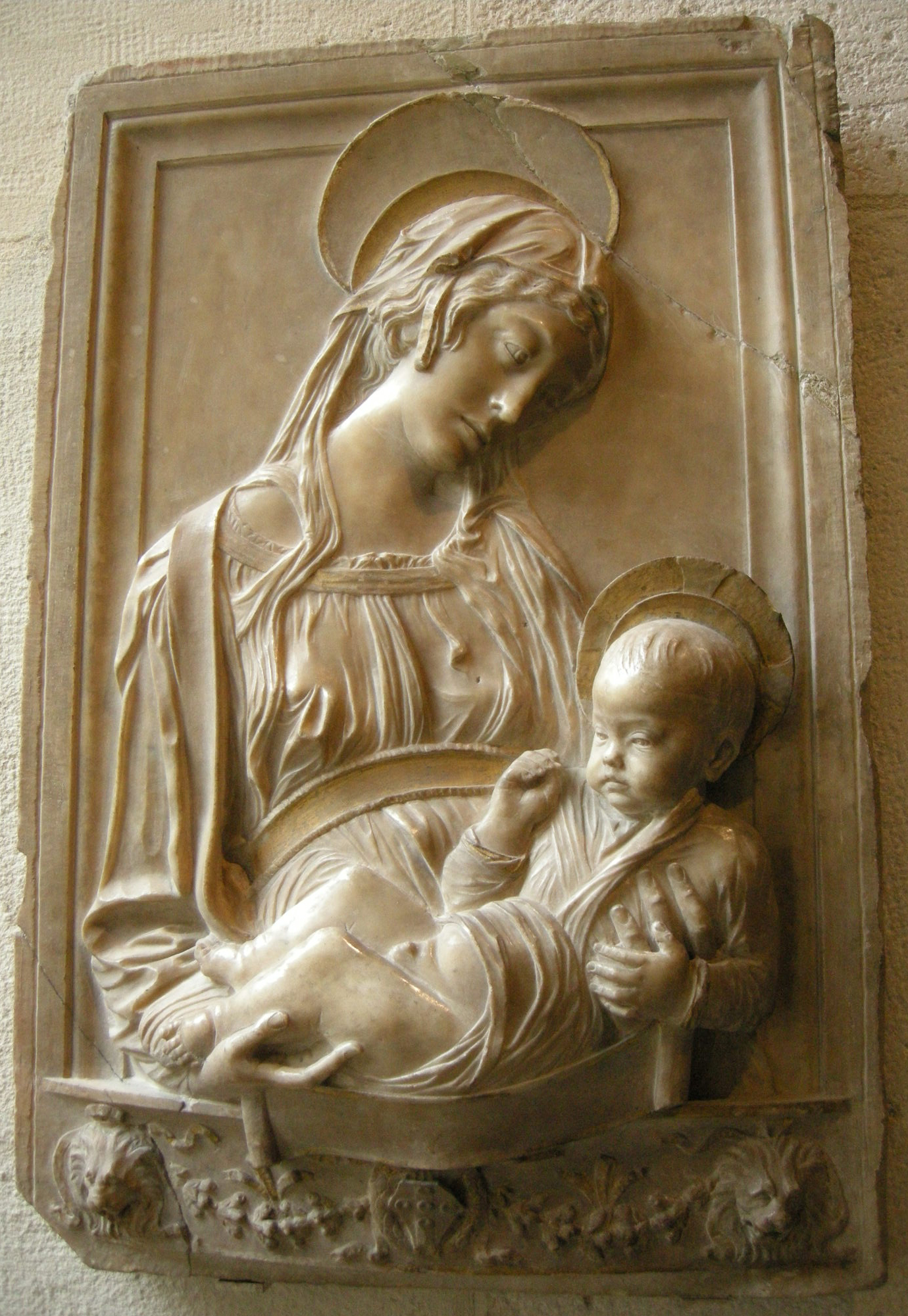 Maestro della madonna piccolomini, 1450-1475.JPG